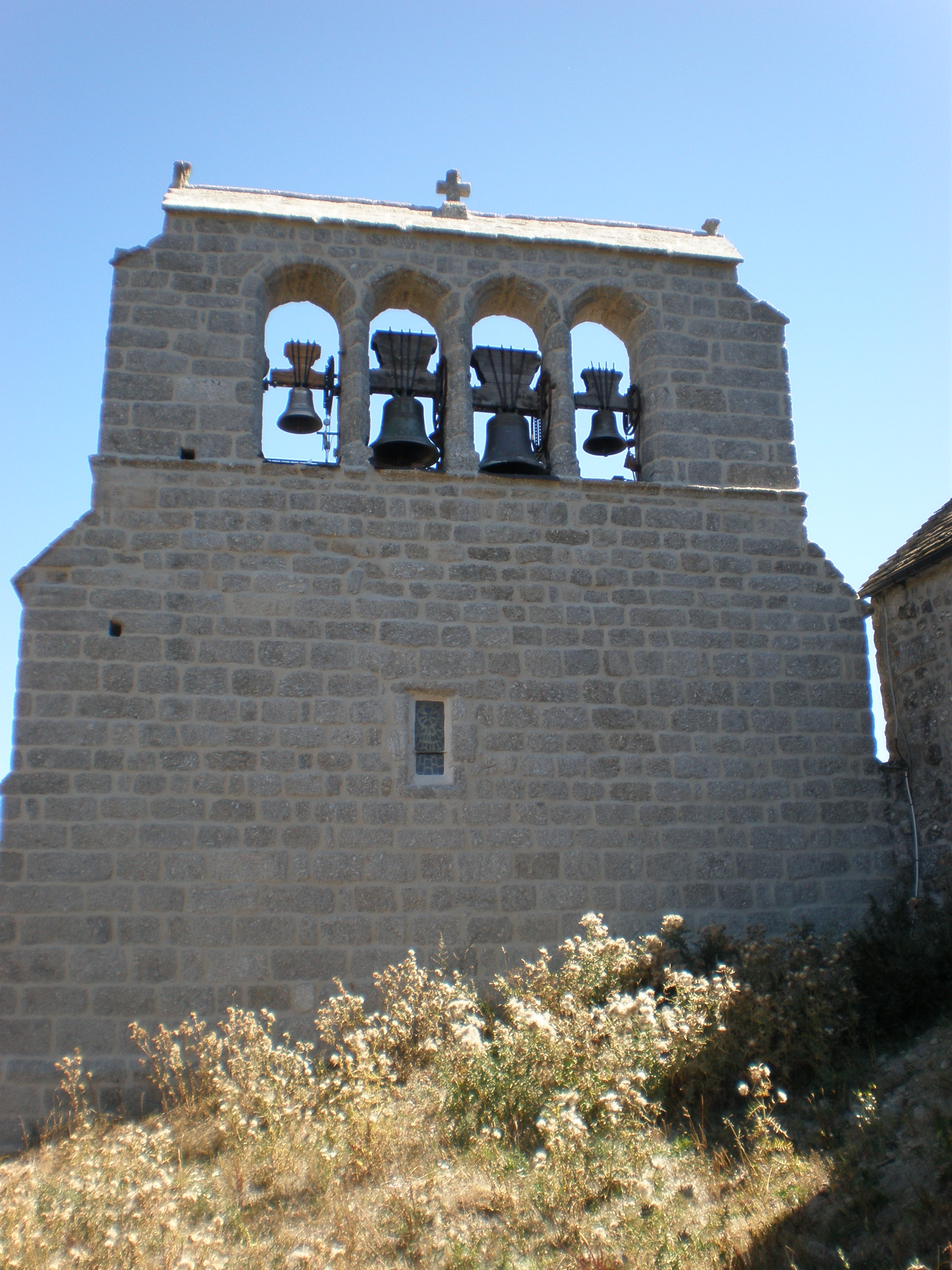 Eglise du village de Prinsuéjols (Lozère)